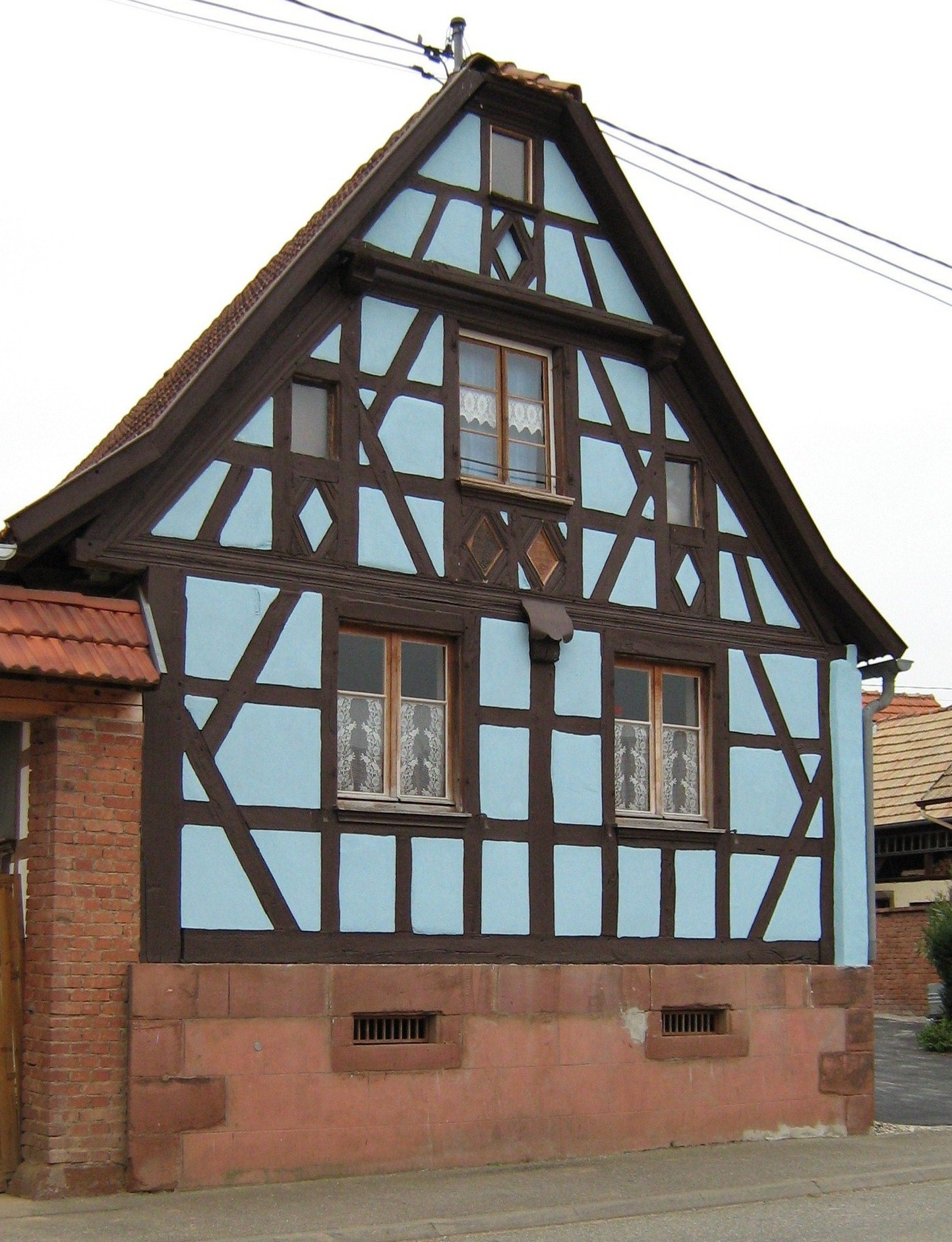 Maison à colombage édifiée en 1855 à Alteckendorf